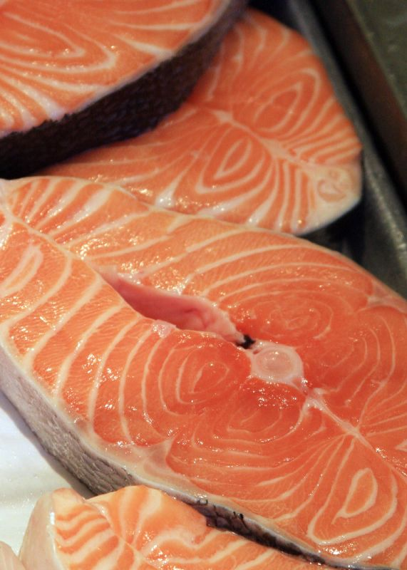 Loch Duart Salmon, Market Hall, Rockridge